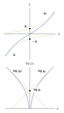 Graphes densité de courant de transfert de charge vs. surtension d'électrode et représentation de Tafel, méthode classique de détermination de la densité de courant d'échange.